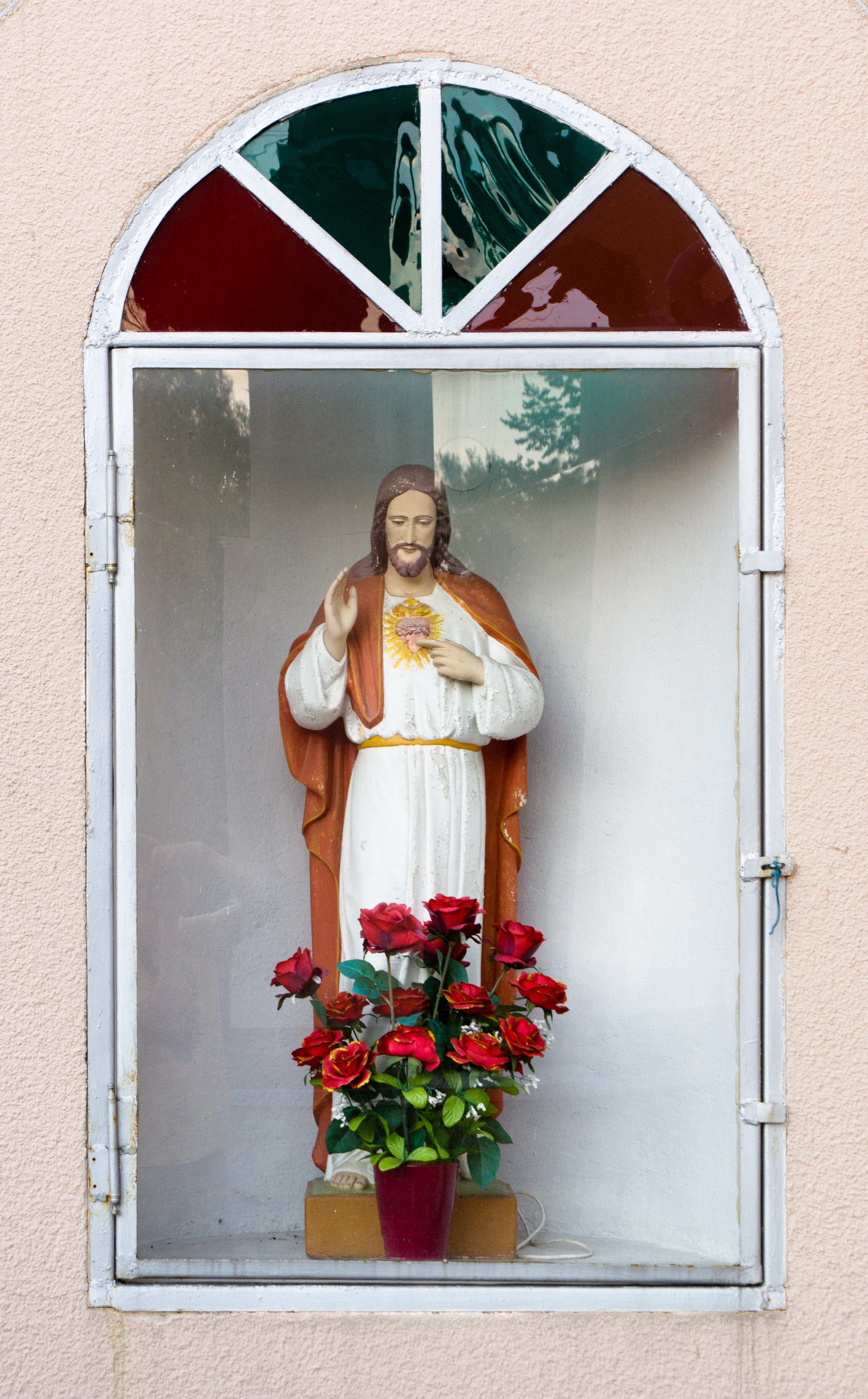 Figurka Jezusa na elewacji kościóła św. Stanisława Biskupa w Nozdrzecu